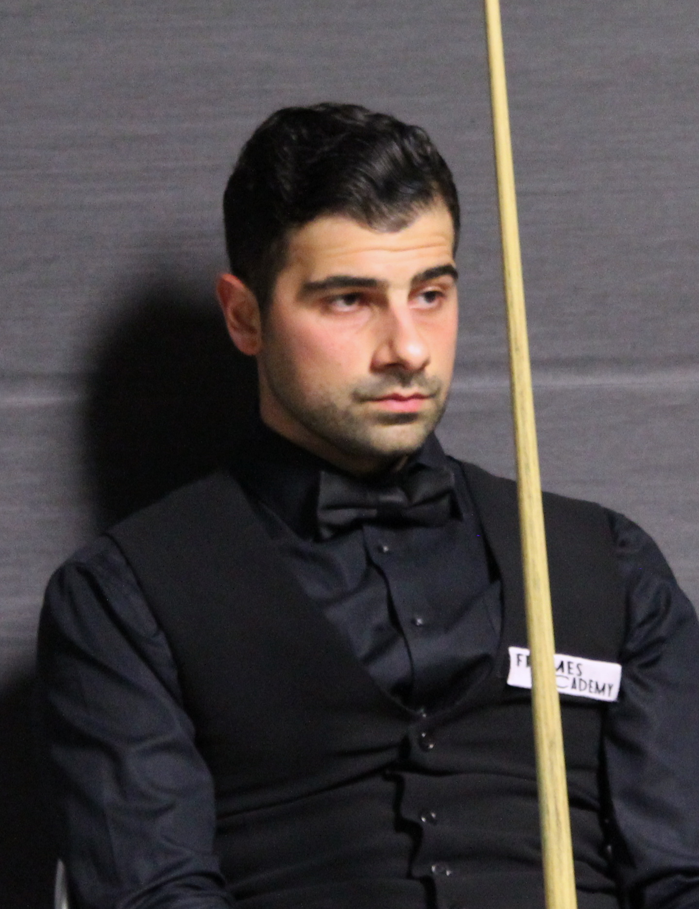 Michael Georgiou beim Paul Hunter Classic 2016